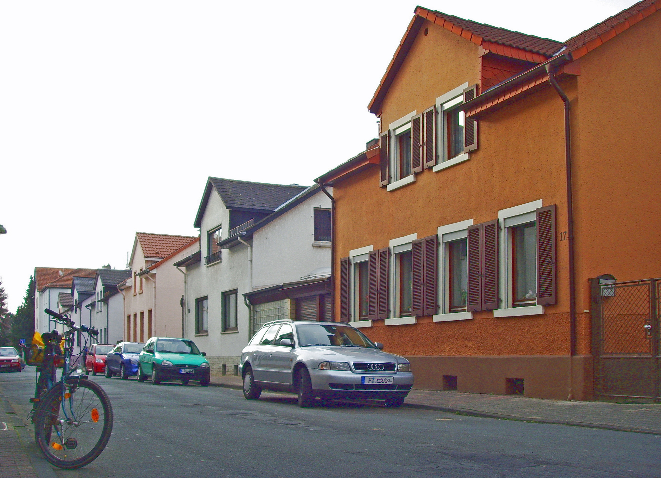 Frankfurt am Main-Heddernheim, Mark-Aurel-Straße